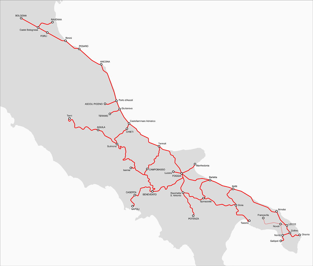 Mappa della rete ferroviaria gestita dalle Strade Ferrate Meridionali dal 1905 (data dello scioglimento della Rete Adriatica) al 1906 (data dell'incorporazione nelle FS). Fonte: Mappa pubblicata in "La Tecnica Professionale" anno 18, n. 10 (ottobre 2011) a pagina 8.